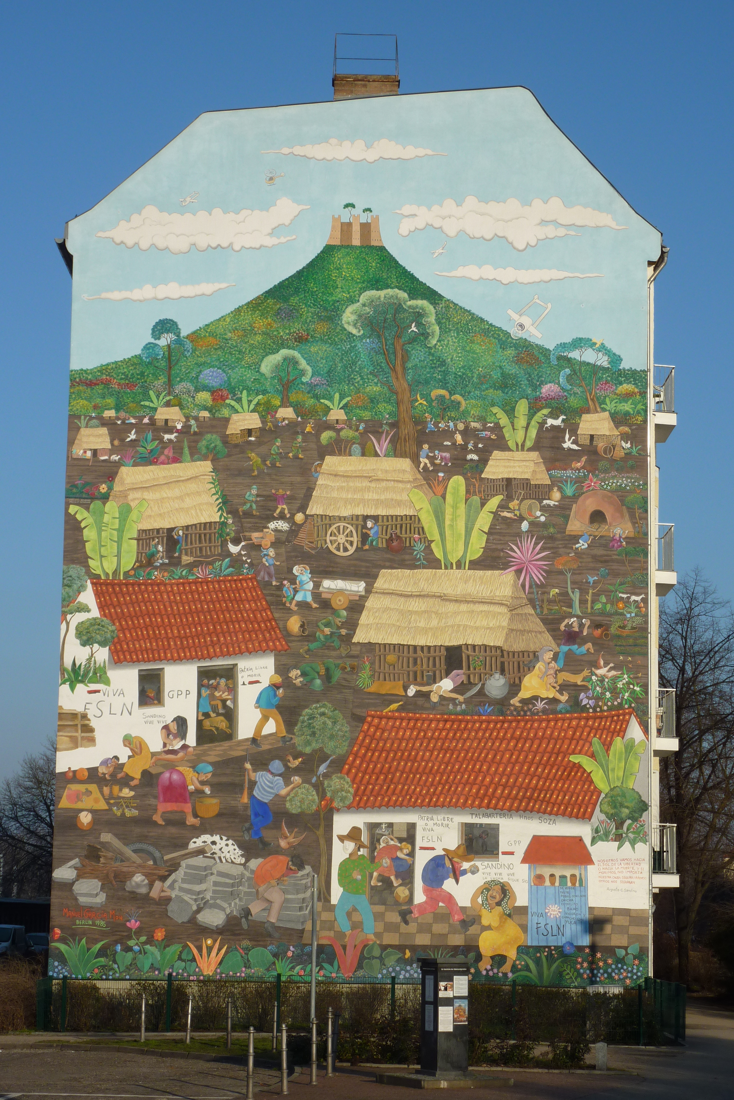 Giebelwandgemälde „Nicaraguanisches Dorf – Monimbó 1978“ von Manuel García Moia am Monimbóplatz im Berliner Ortsteil Rummelsburg.